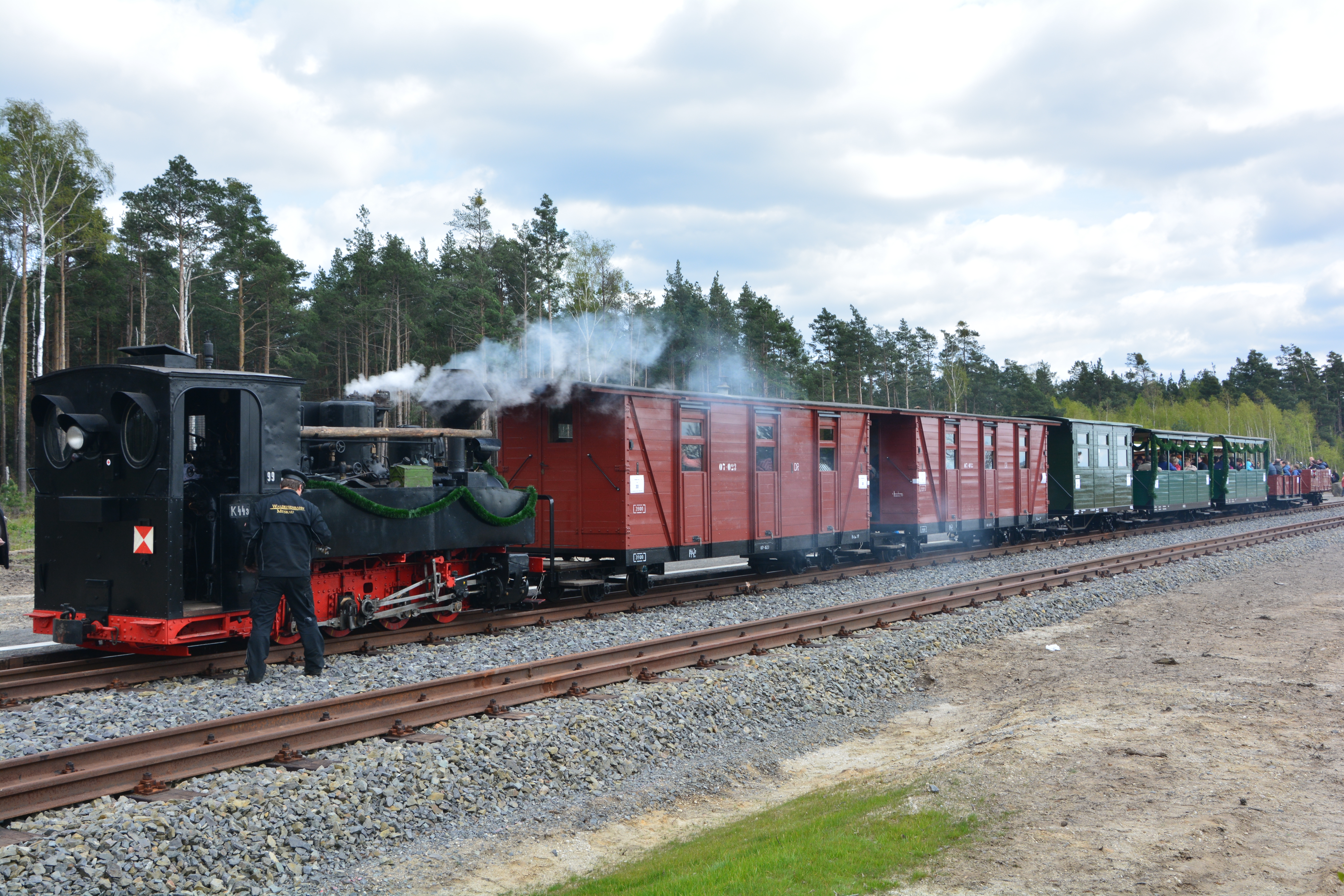 Waldeisenbahn Bad Muskau: Einweihung der "Tonbahn" am 14. bis 17. April 2017. Dampflok BR 99 3315-1, Baujahr 1917